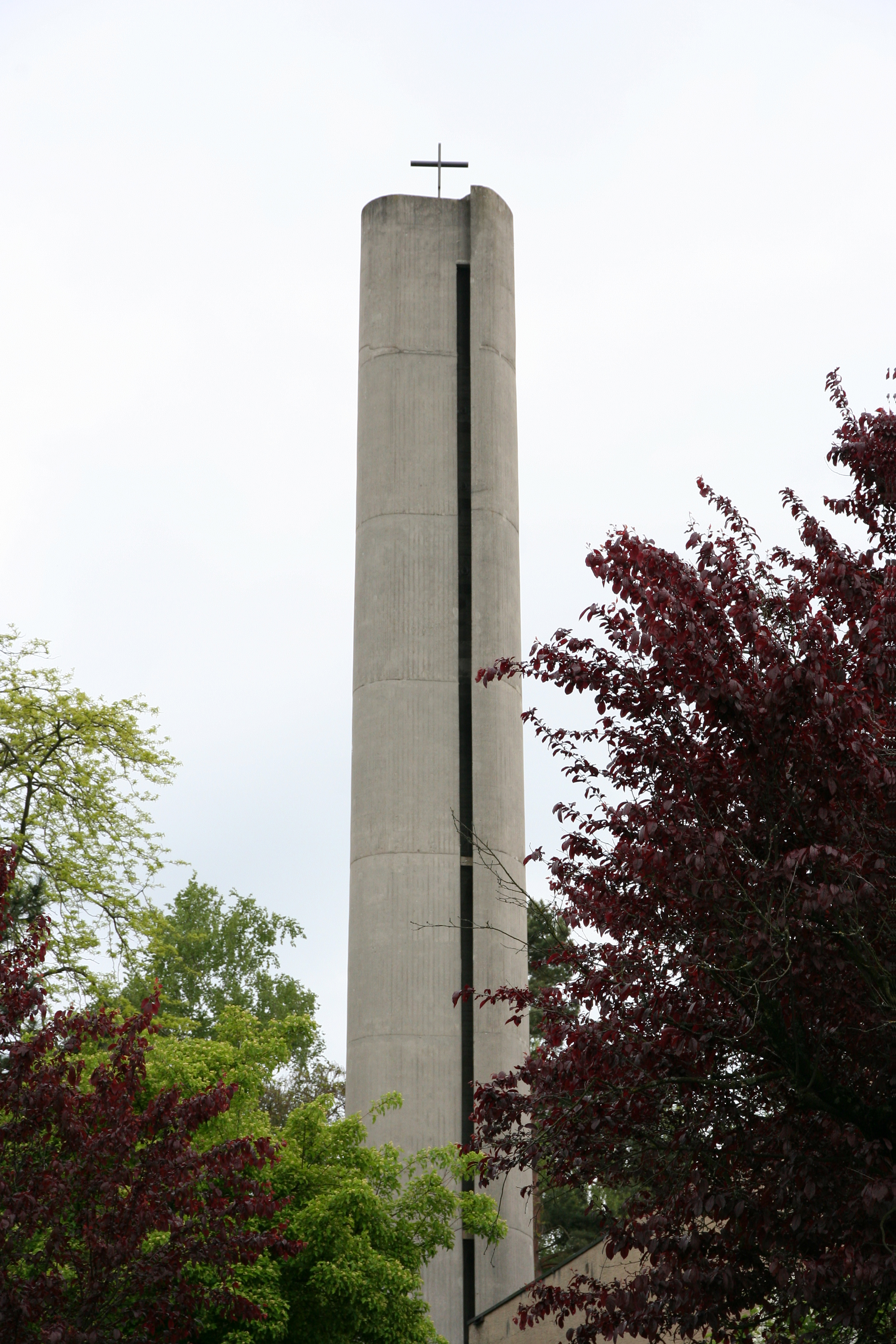 Römisch-katholische Kirche Bruder KIaus Basel, Kirchturm